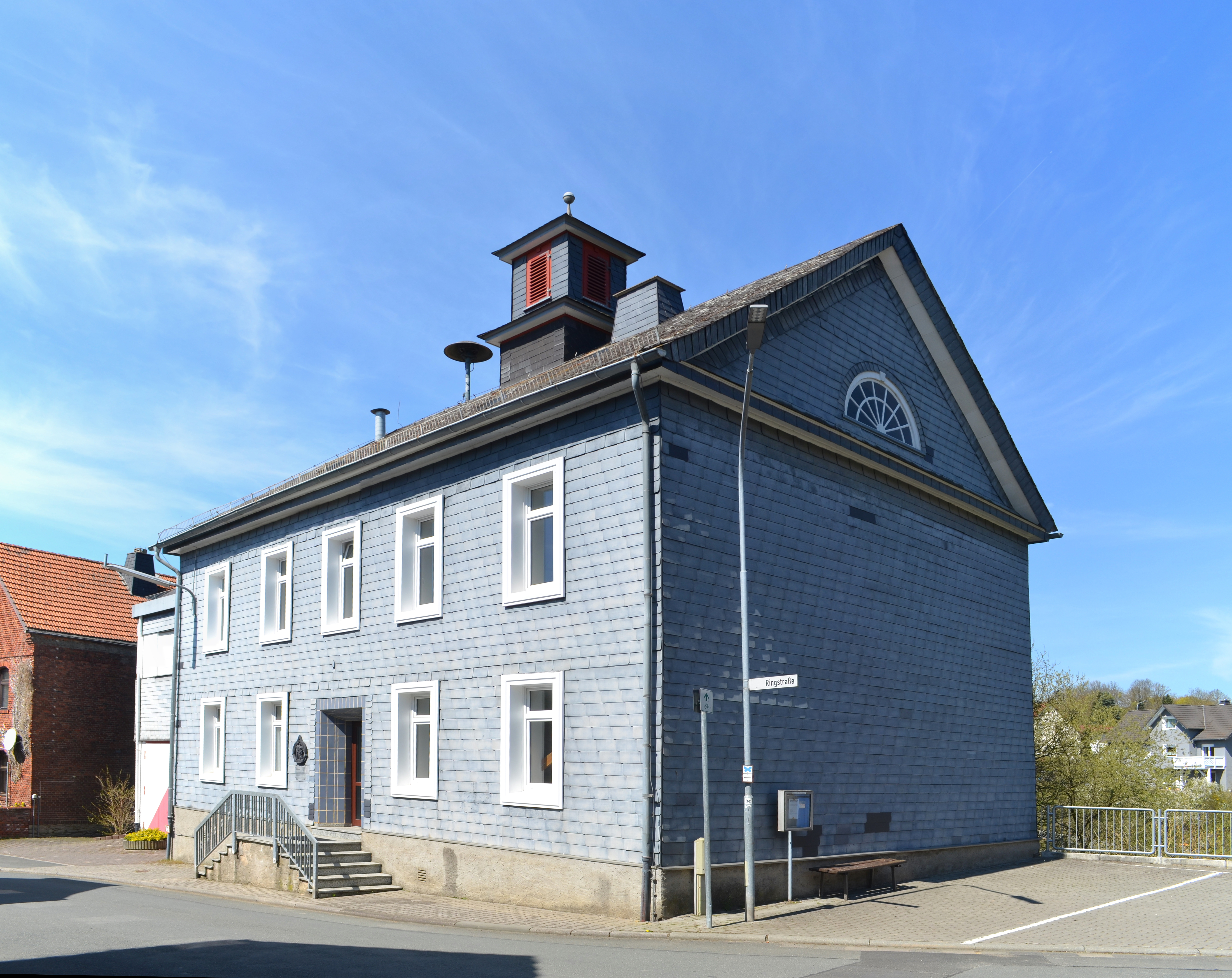 Lützendorf, Ringstraße 26